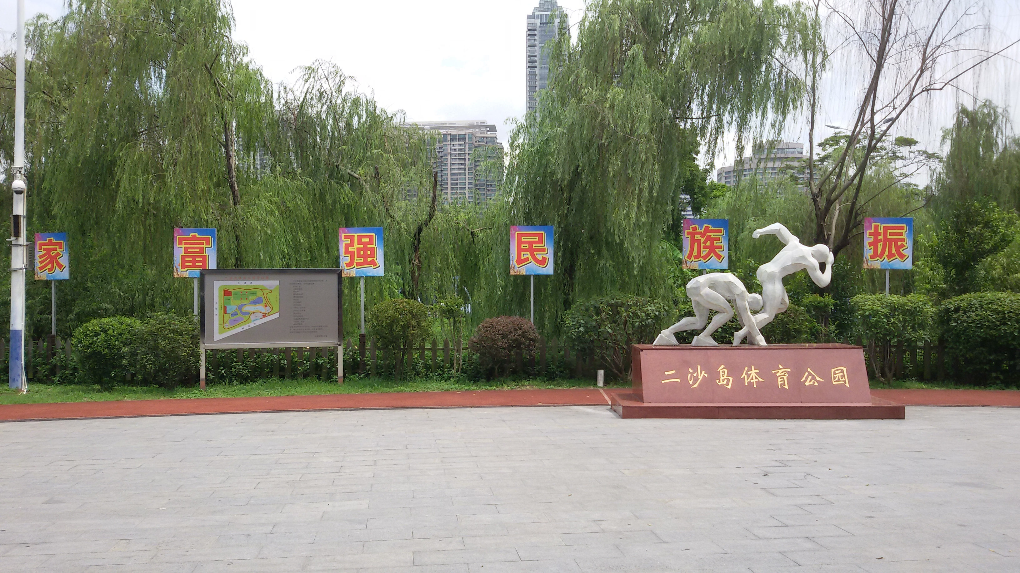 粵語: 二沙島體育公園